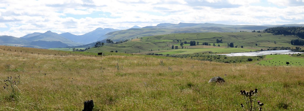 Tourbière du Jolan, Parc naturel des volcans d'Auvergne - Cantal - France